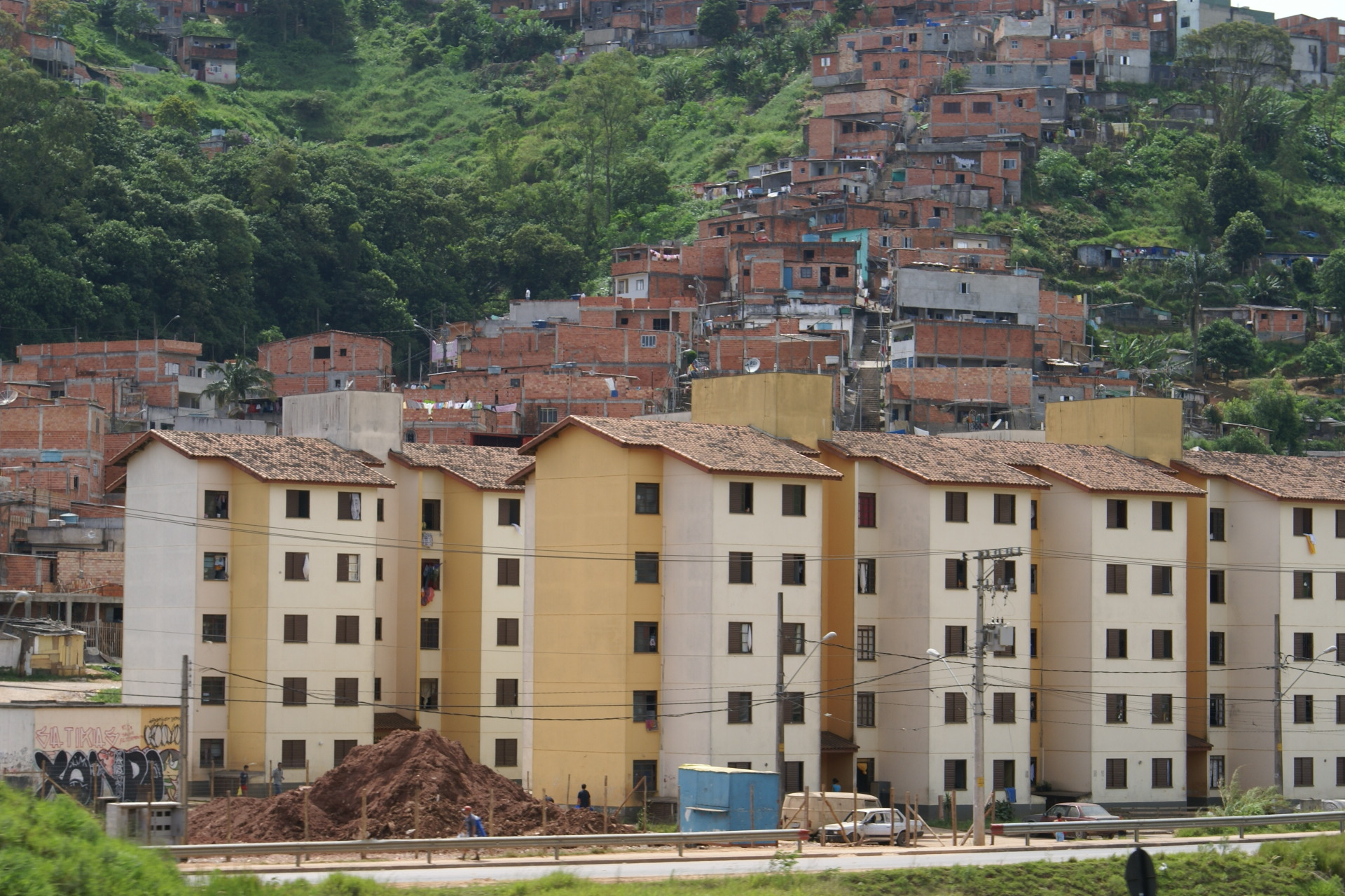 Conjuntos habitacionais populares e uma favela em São Bernardo do Campo, Brasil - Housing and slum in São Bernardo do Campo, Brazil